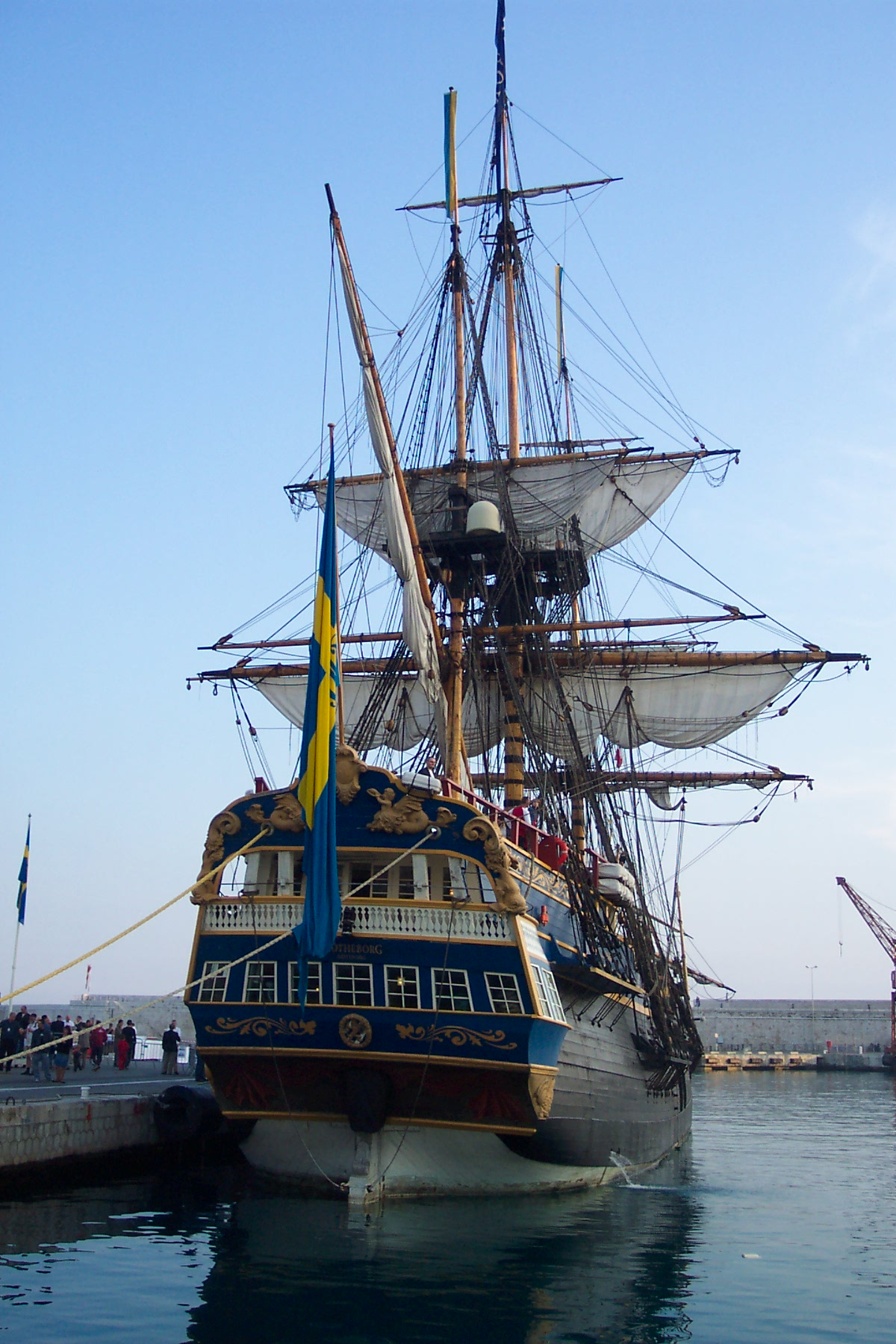 Nice-port Le port de Nice et le voilier Gotegorg amarré